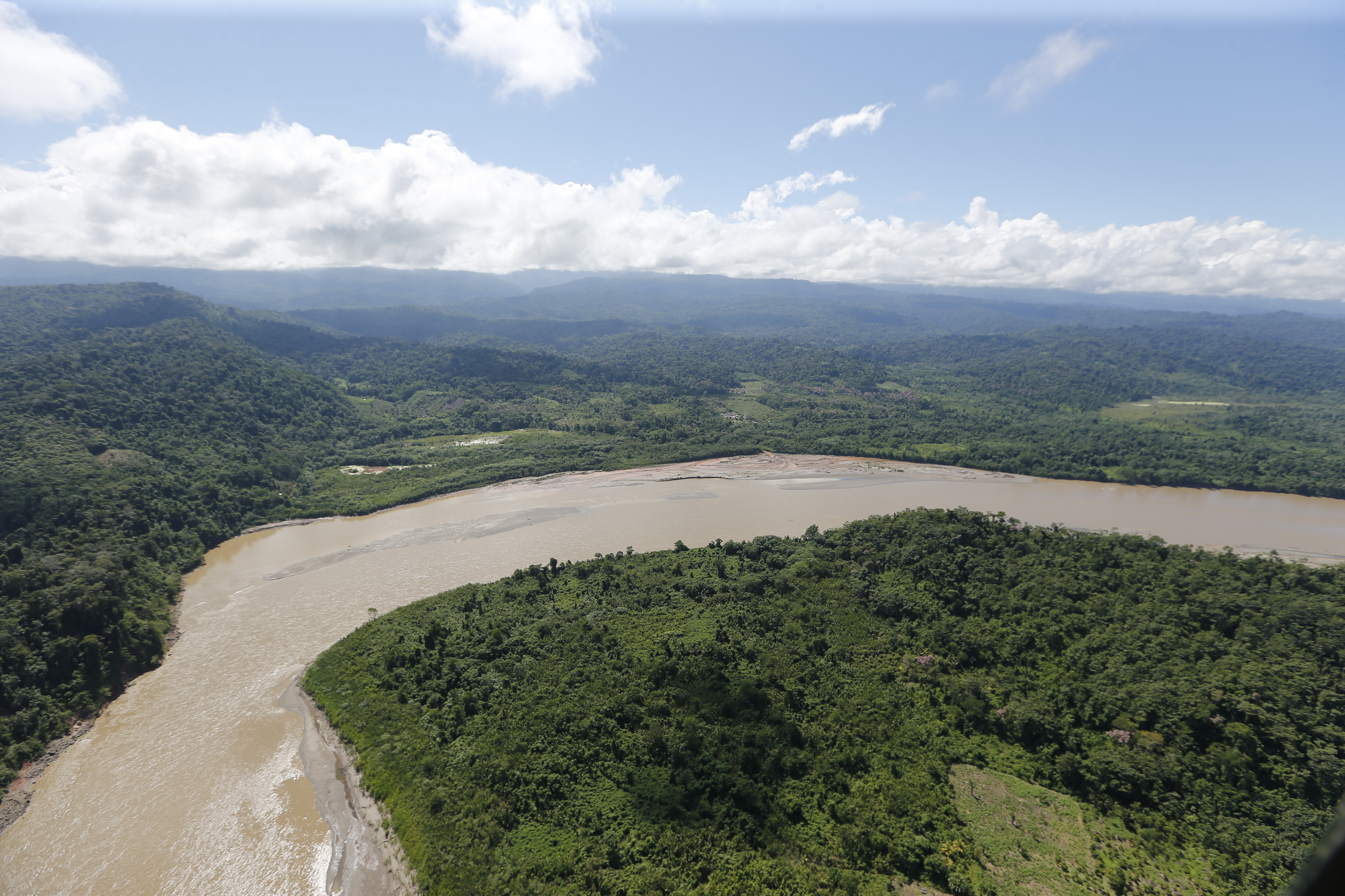 MINISTRO DE DEFENSA JAKKE VALAKIVI SUPERVISÓ BASES CONTRATERRORISTAS EN EL VRAEM